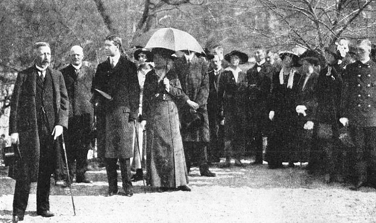 Gunnar Wennerberg-statyn i Stockholm 1916 (invigning)